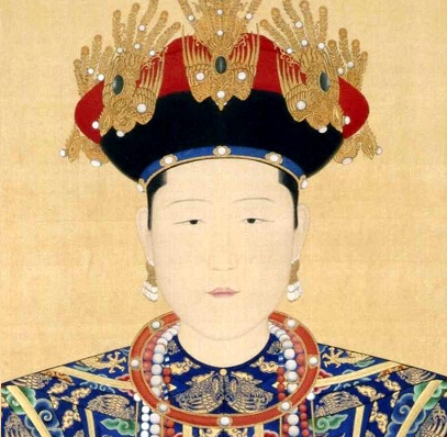 孝康章皇后, 康熙帝生母肖像